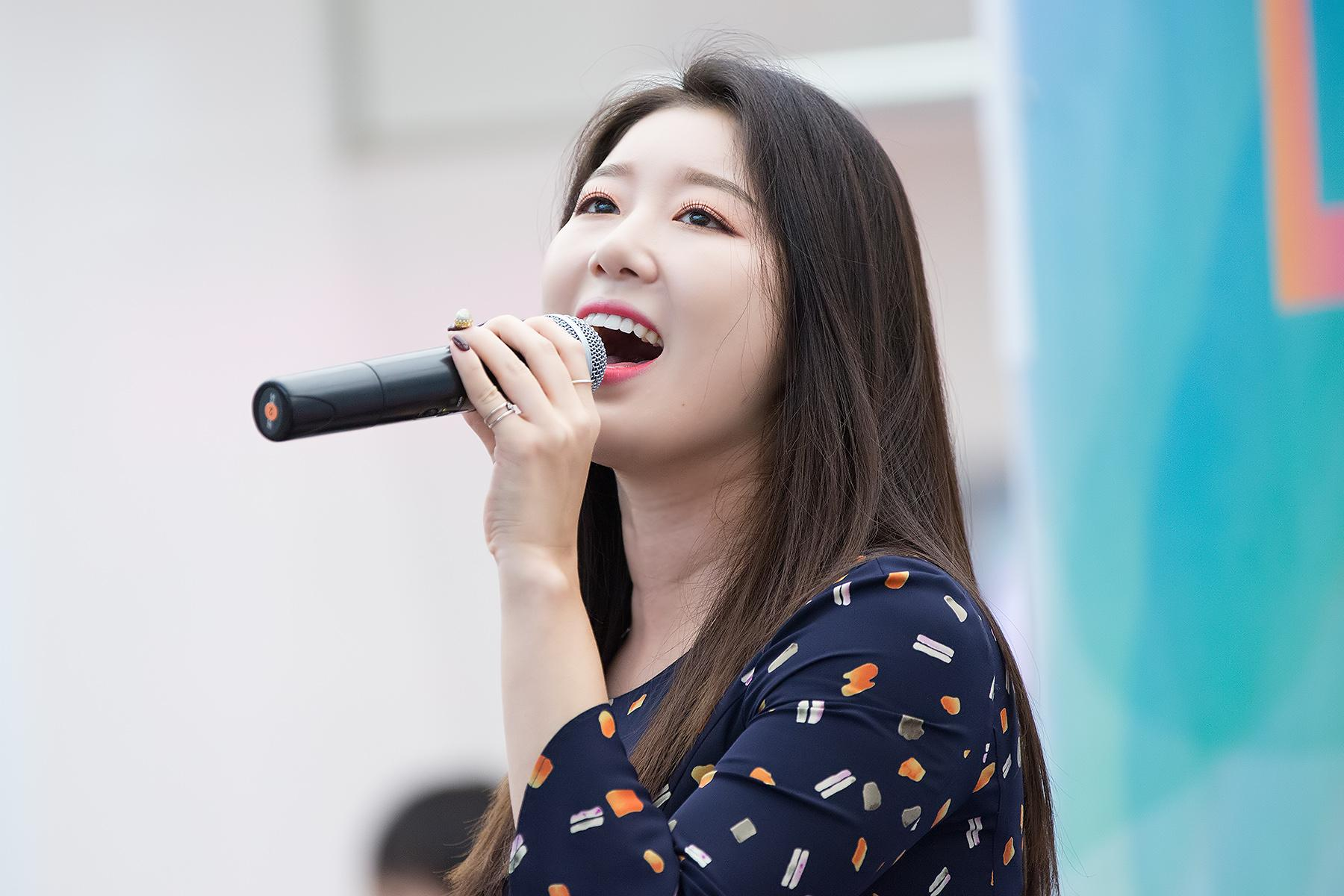 160923 코엑스 라이브플라자 Learn Together 다문화 공연